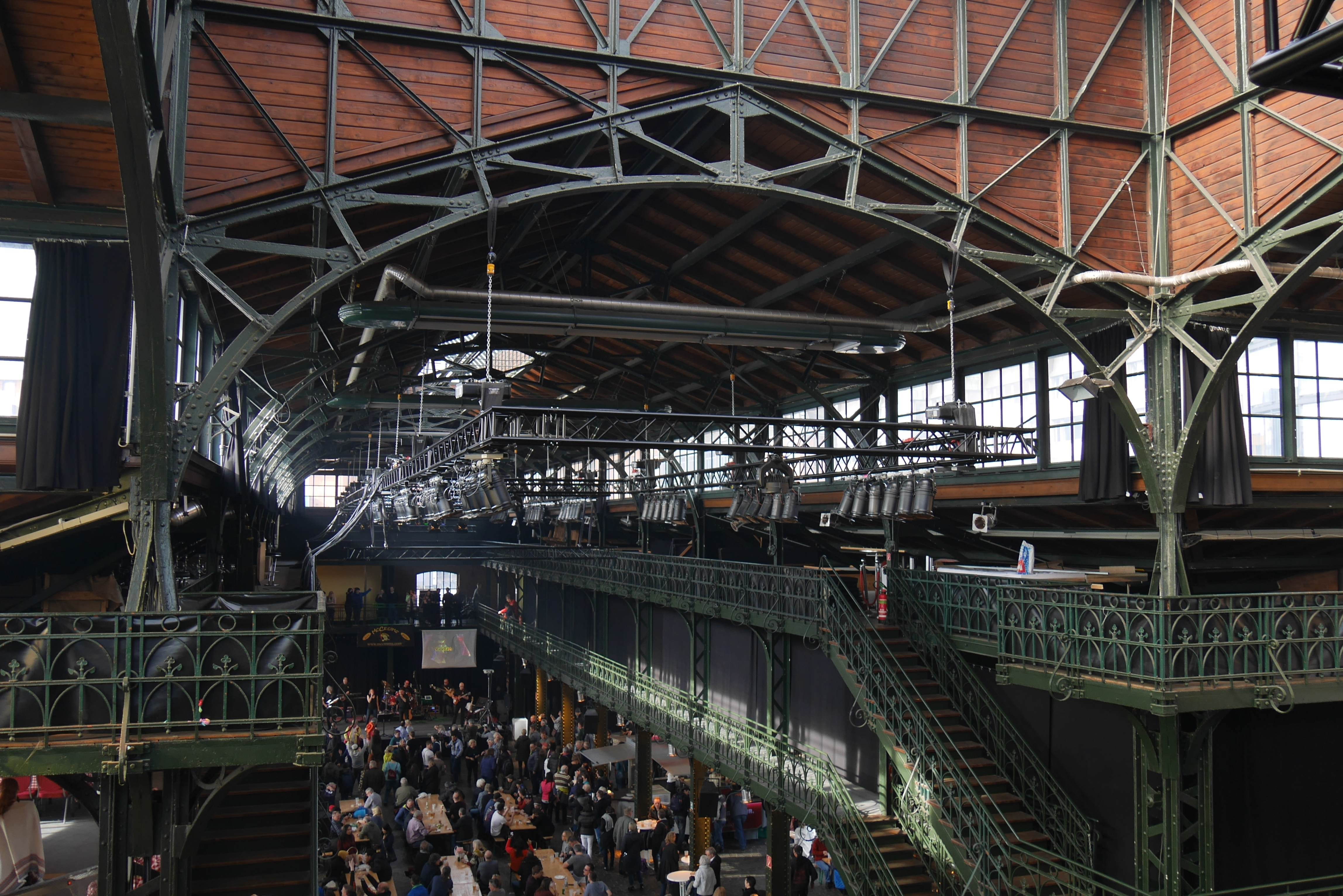 Fischauktionshalle, Blick nach Westen Live Musik am Sonntag Vormittag